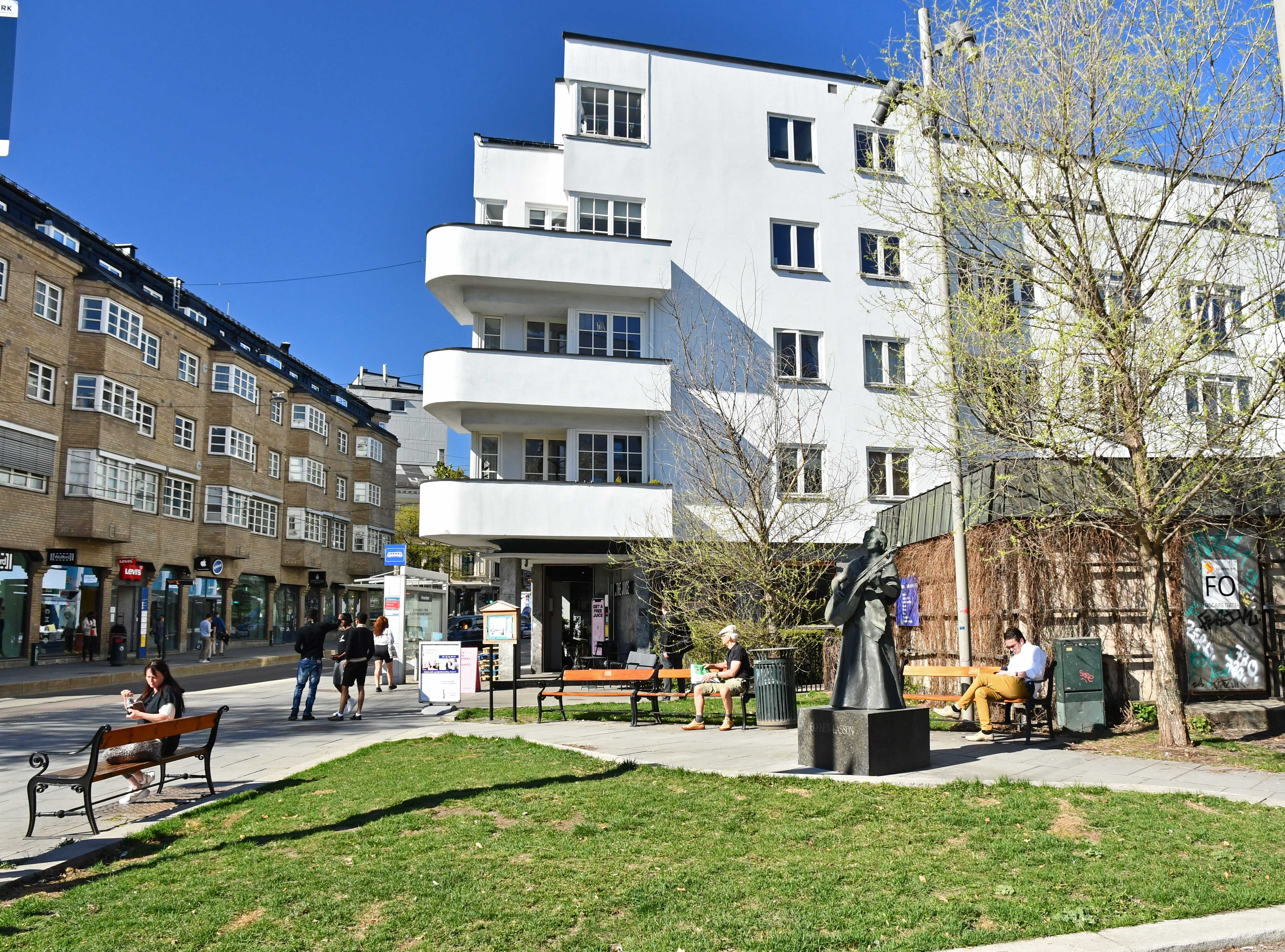 Plass ved gatekrysset Hegdehaugsveien Oscars gate med skulptur av Bokken Lasson og den funksjonalistiske bygningen Oscars gate 19. Hegdehaugsveien fortsetter opp til venstre.